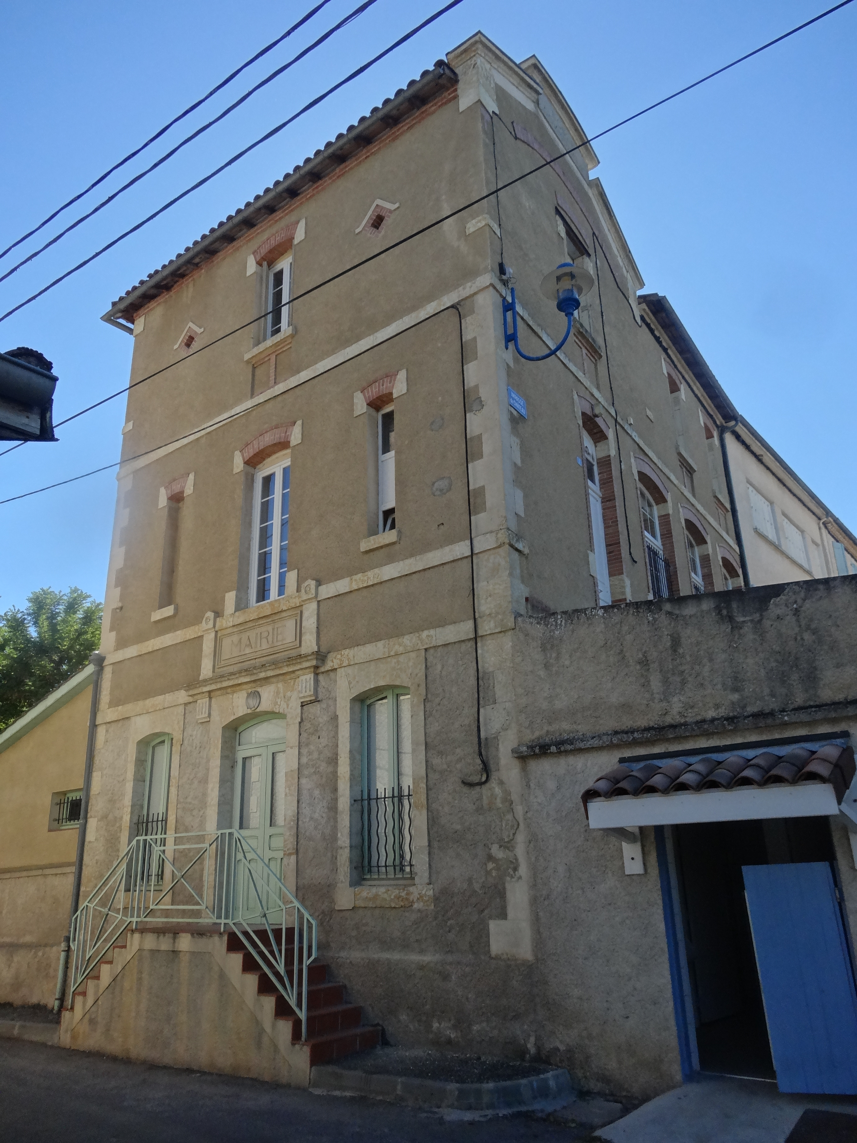 Ancienne mairie d'Auterive.